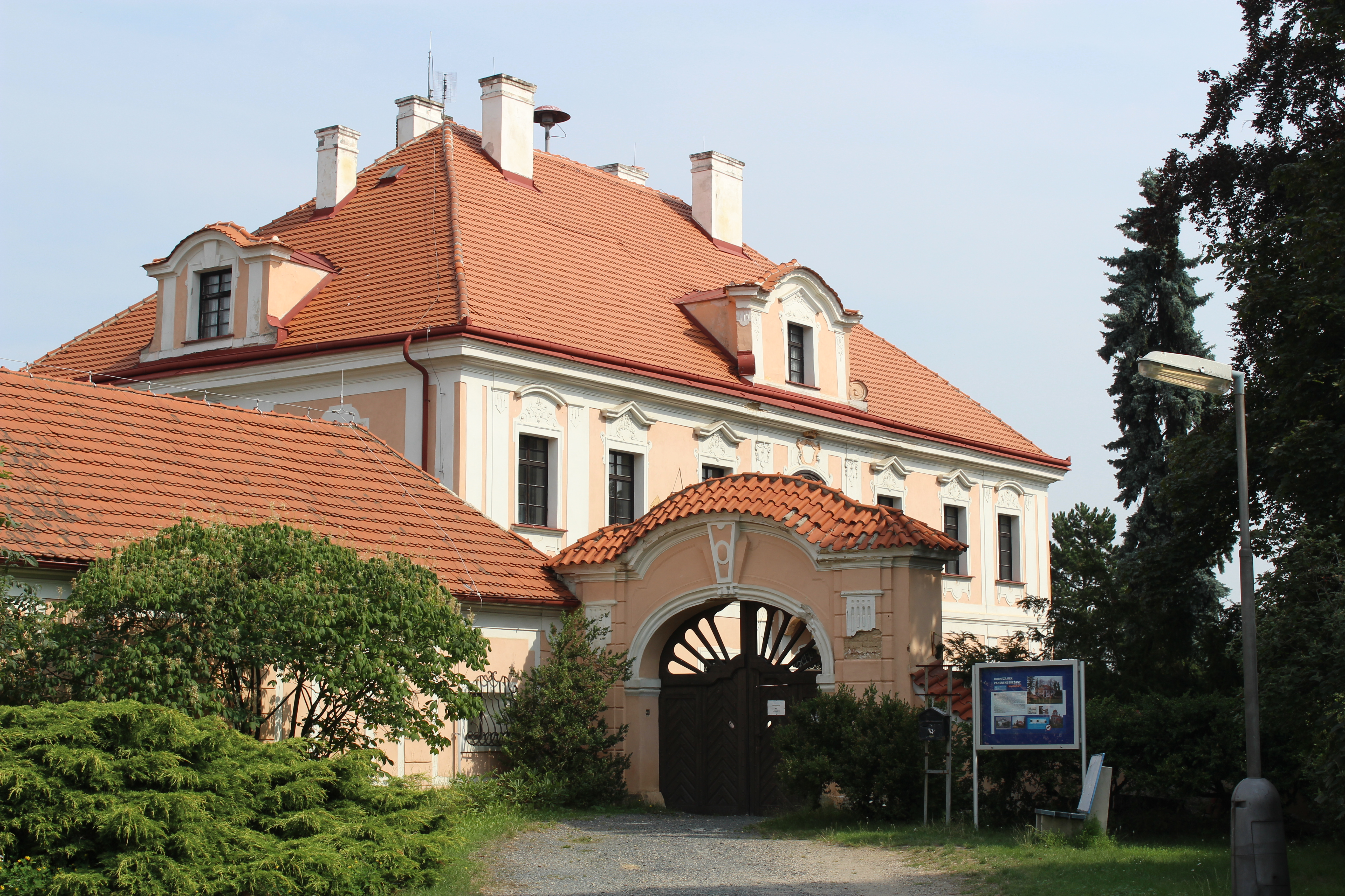 Snímky benediktinských klášterů, se kterými se RNDr. Jan Maňák se přihlásil do mezinárodní fotografické soutěže VIA BENEDICTINA K účasti v soutěži jej vyzval Mgr. Dušan Foltýn jeden z organizátorů a přední český monasteriolog . V soutěži Honza Maňák reprezentoval i svého zaměstnavatele Atelier Svatopluk, o.p.s. v Litni,, který pro něj s Úřadem práce Beroun vytvořil chráněné pracovní místo fotograf a propagovat krásy Litně – Berounska a Karlštejnska. Proto také zamířil s fotoaparátem na 4 místa spojená s benediktinským řádem - Břevnov a Emauzy v Praze, Sv. Jan pod Skalou a Panenské Břežany a pro soutěž vybral 10 snímků. V polském Krakově byl oceněn snímek sv. Jana pod Skalou.